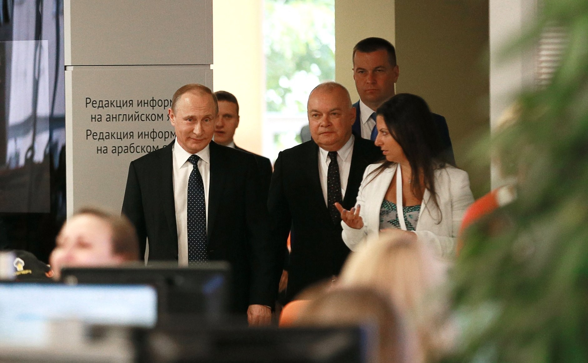 Посещение международного информационного агентства «Россия сегодня». С генеральным директором агентства Дмитрием Киселёвым и главным редактором Маргаритой Симоньян.